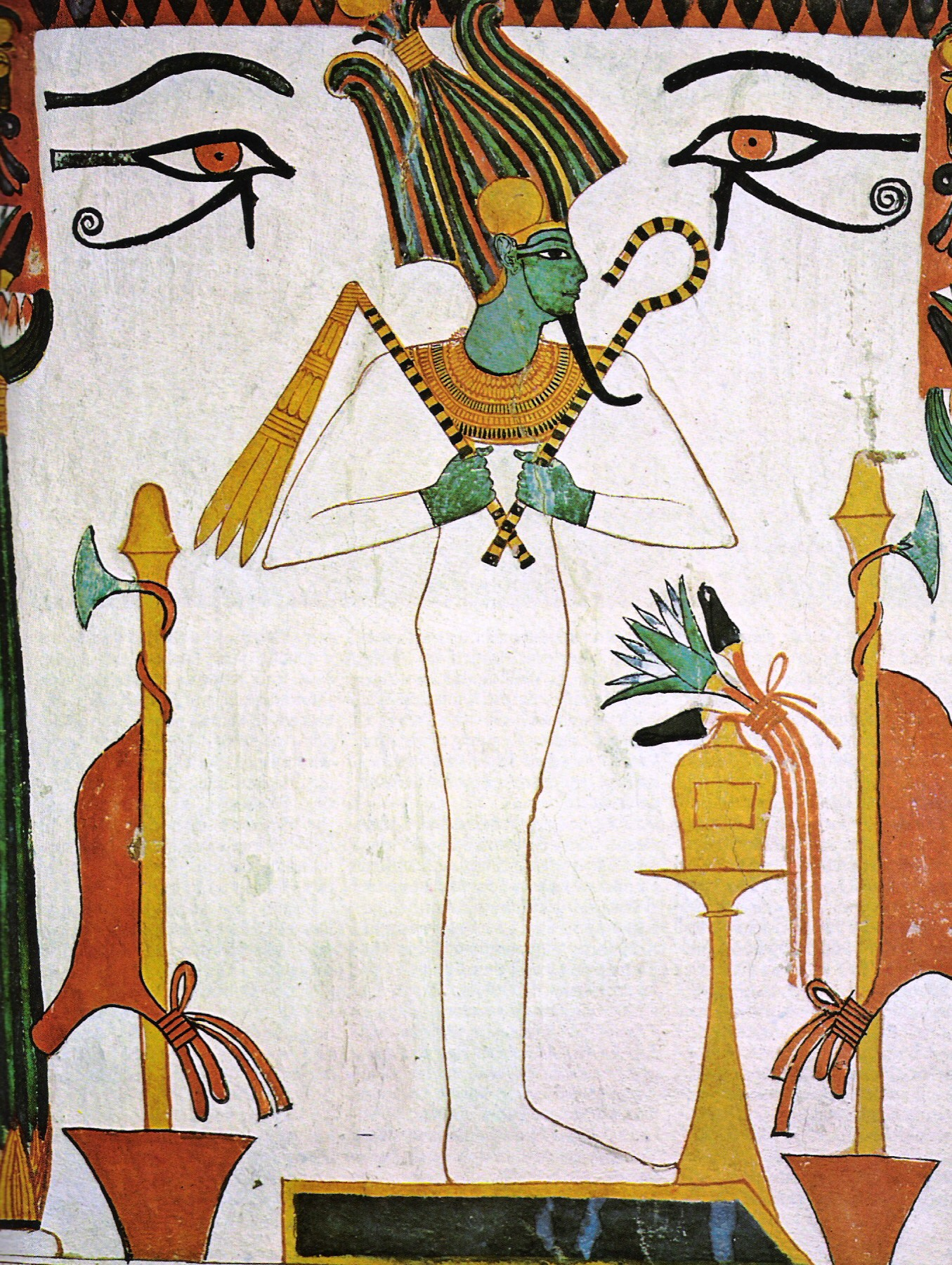 Osiris als Jenseitsherrscher, Detail aus dem Grab des Sennedjem